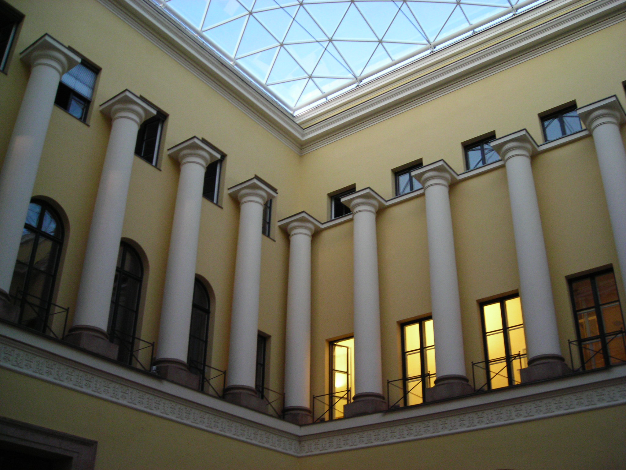 Der Odeon im Bayerischen Staatsministerium des Innern, München